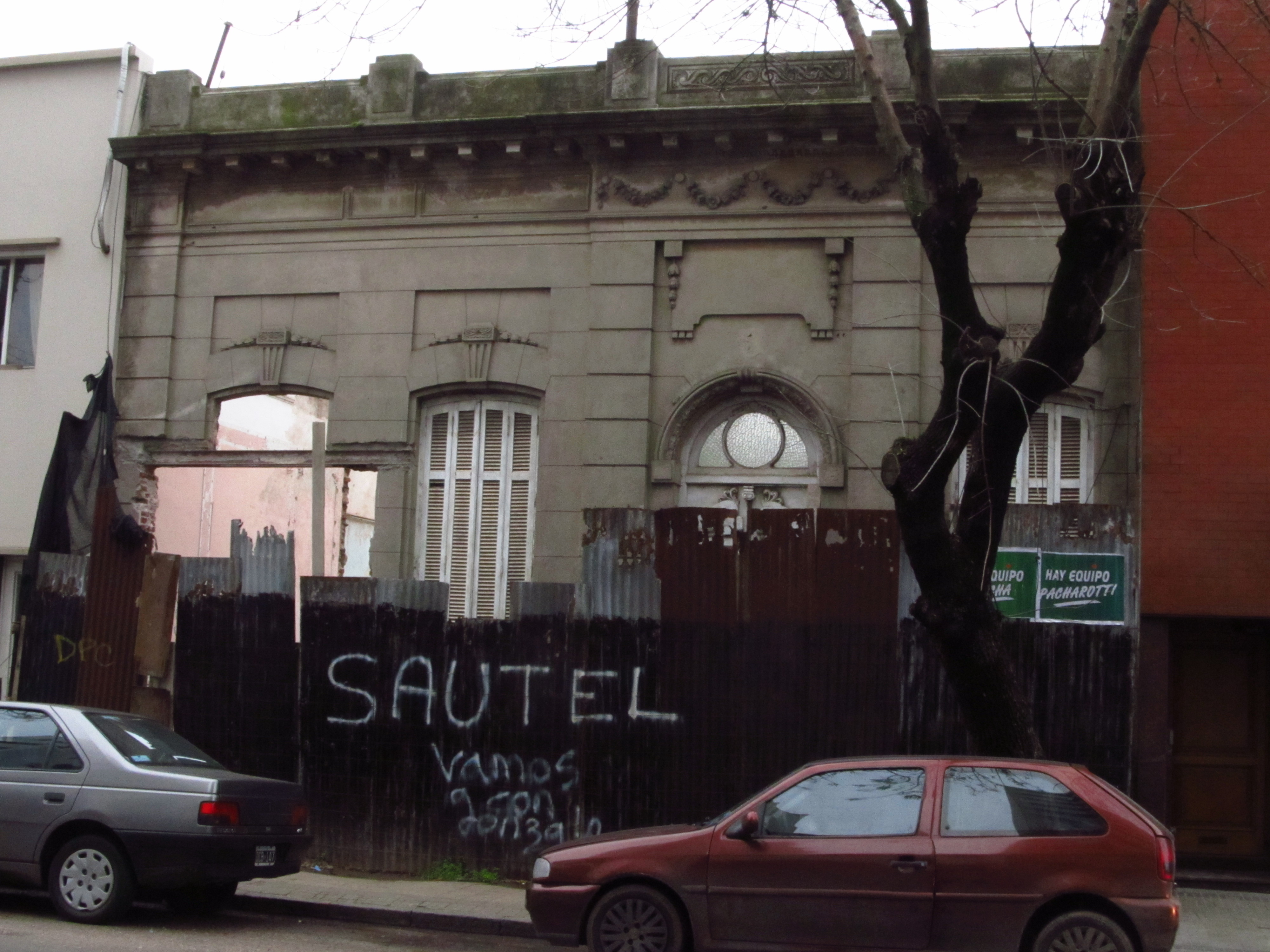 Demolición de la casa de Cipriano Reyes en La Plata, ubicada en calle 59 entre 11 y 12